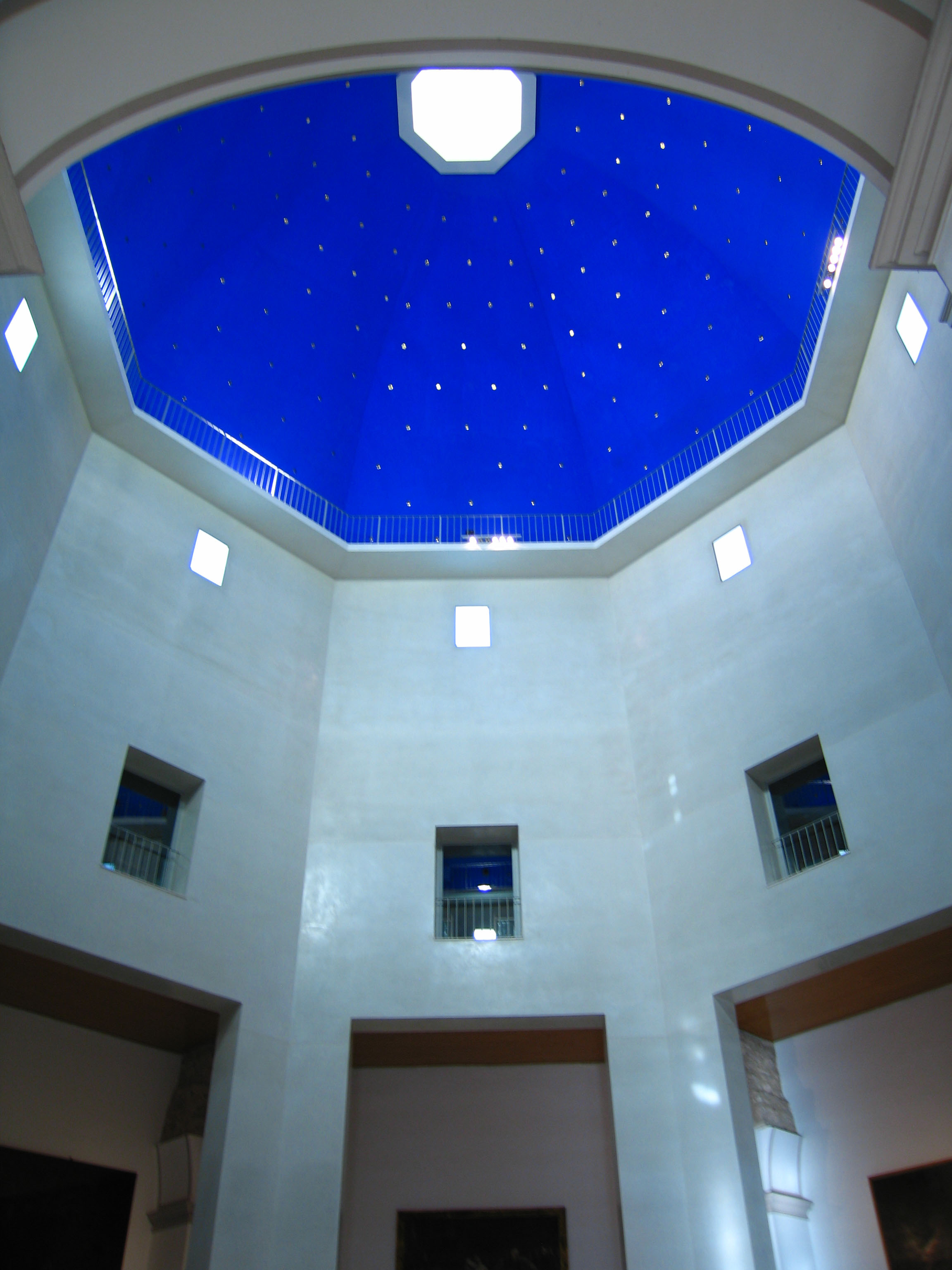 Església de Sant Pius V, València